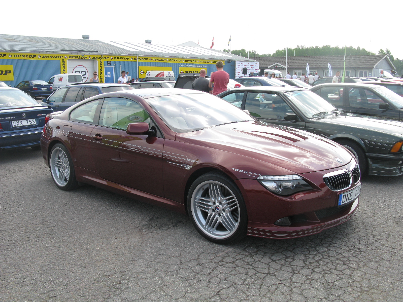 BMW Alpina B6 Coupé